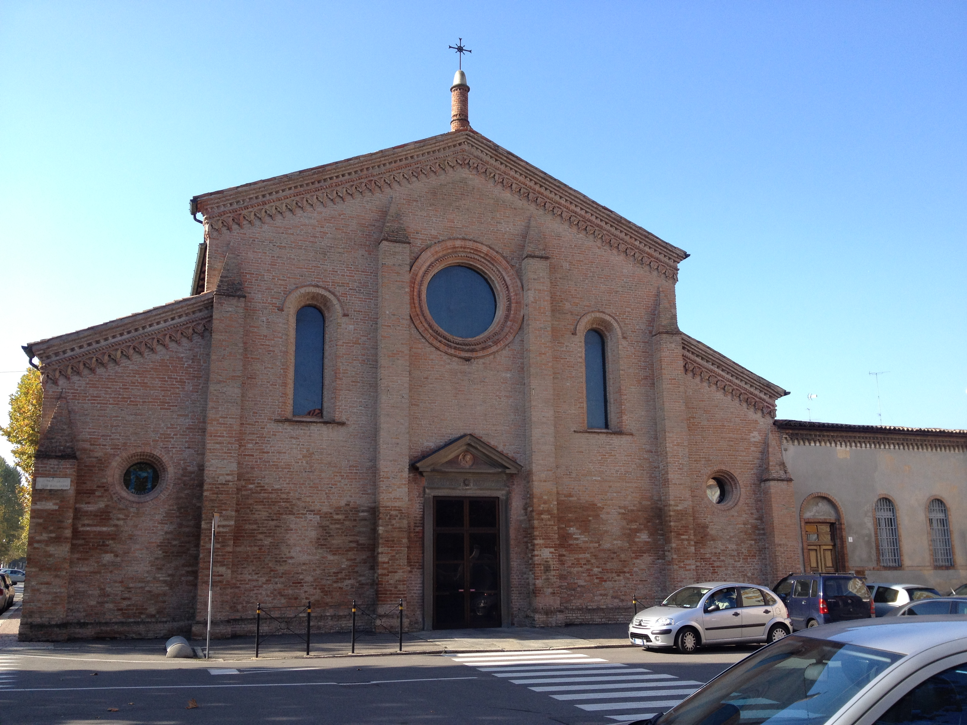 Veduta della Chiesa di Santa Maria delle Grazie a Voghera (PV)